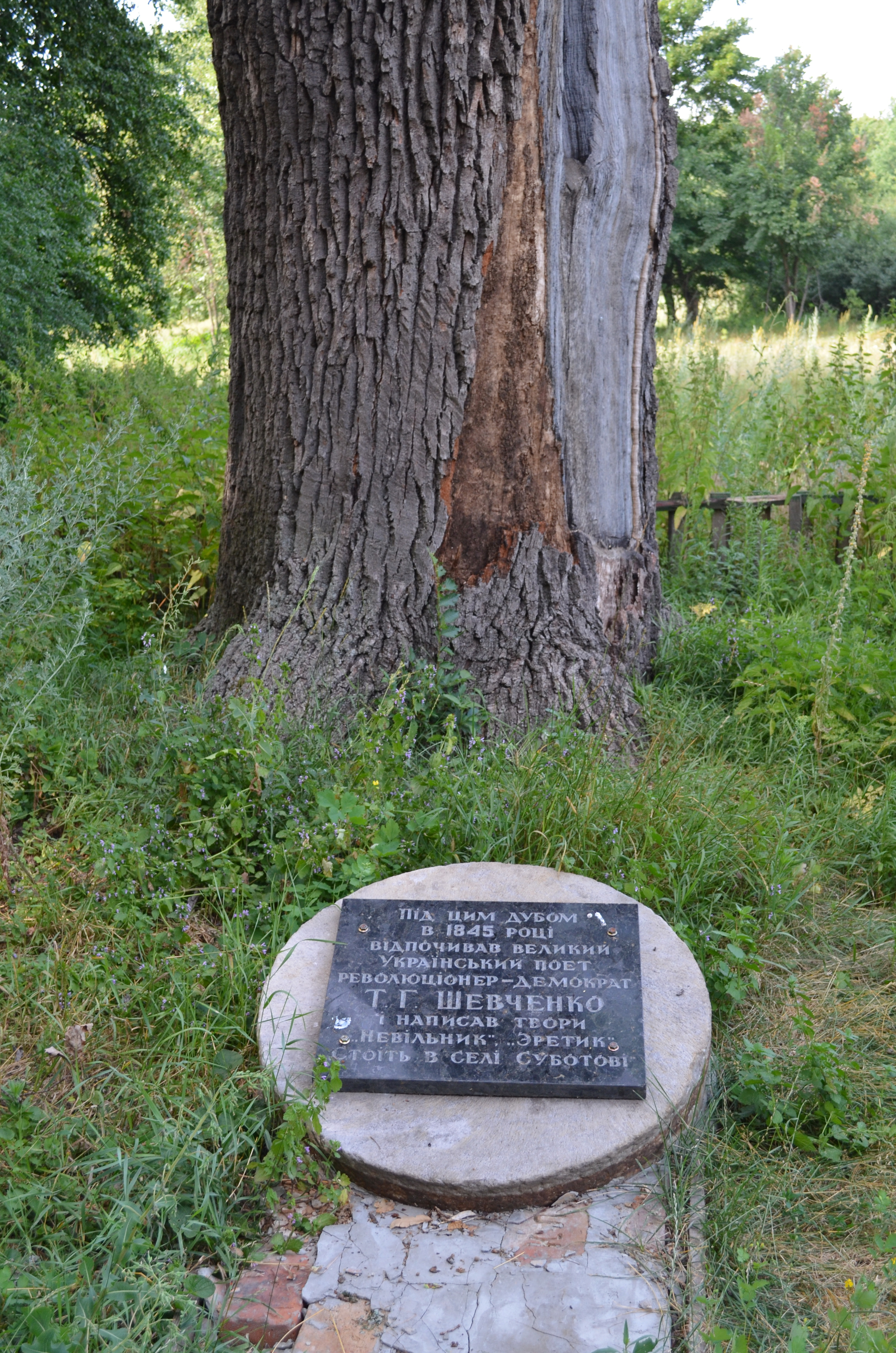 Колишня садиба Лук’яновича, де жив Т.Г.Шевченко в 1845 р.: будинок, комора, дуб, с. Мар’янське